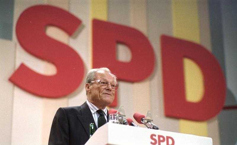 30.8.-2.9.1988 SPD-Parteitag in Münster, Halle Münsterland